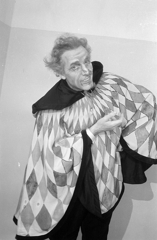 Original image description from the Deutsche Fotothek Szenenbilder mit Josef Burgwinkel in der Titelrolle, Tiana Lemnitz als Gilda, Carola Goerlich als Maddalena und Peter Anders als Graf von Mantua